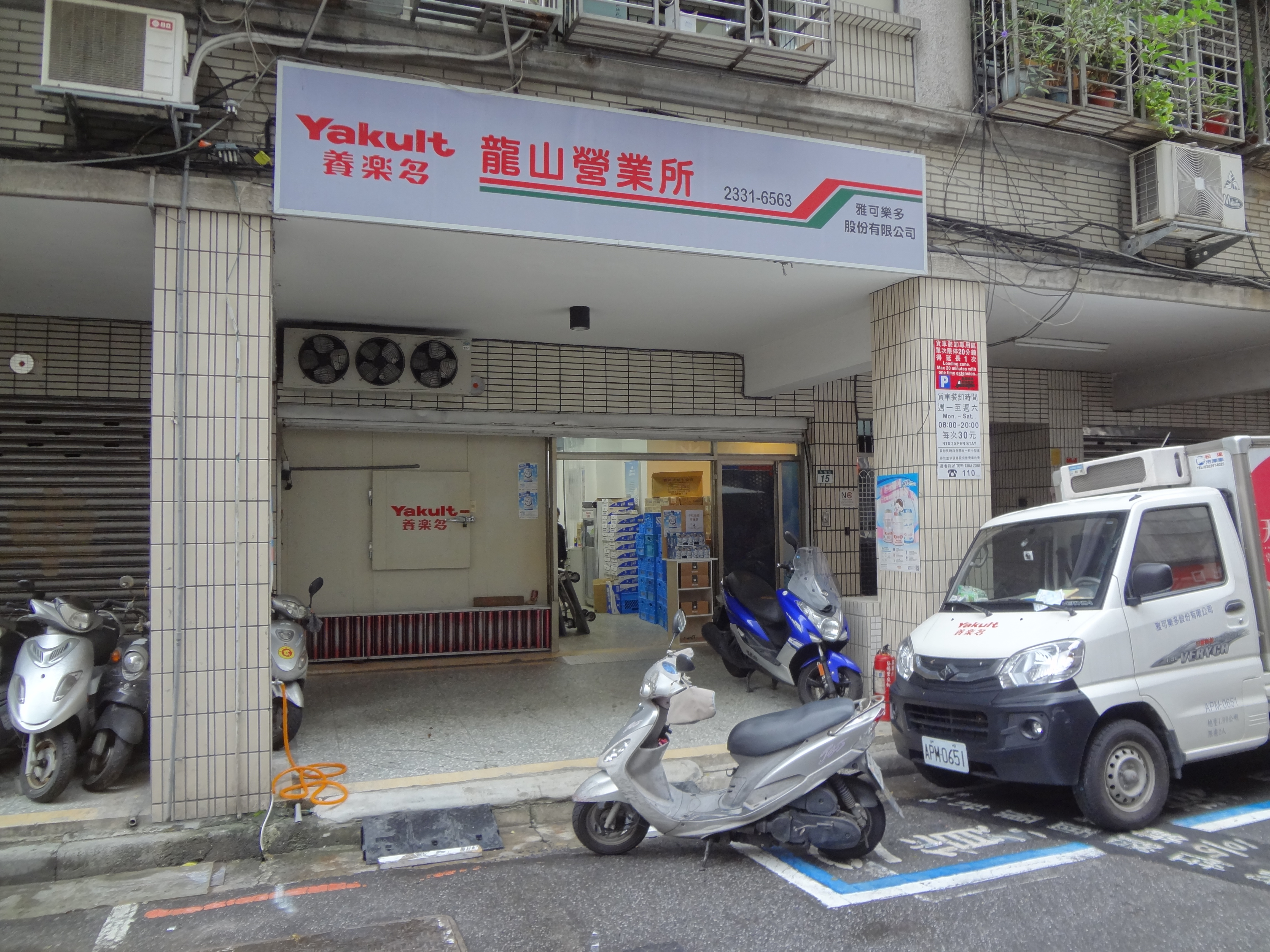 養樂多龍山營業所，位於臺北市萬華區永福街15號1樓。